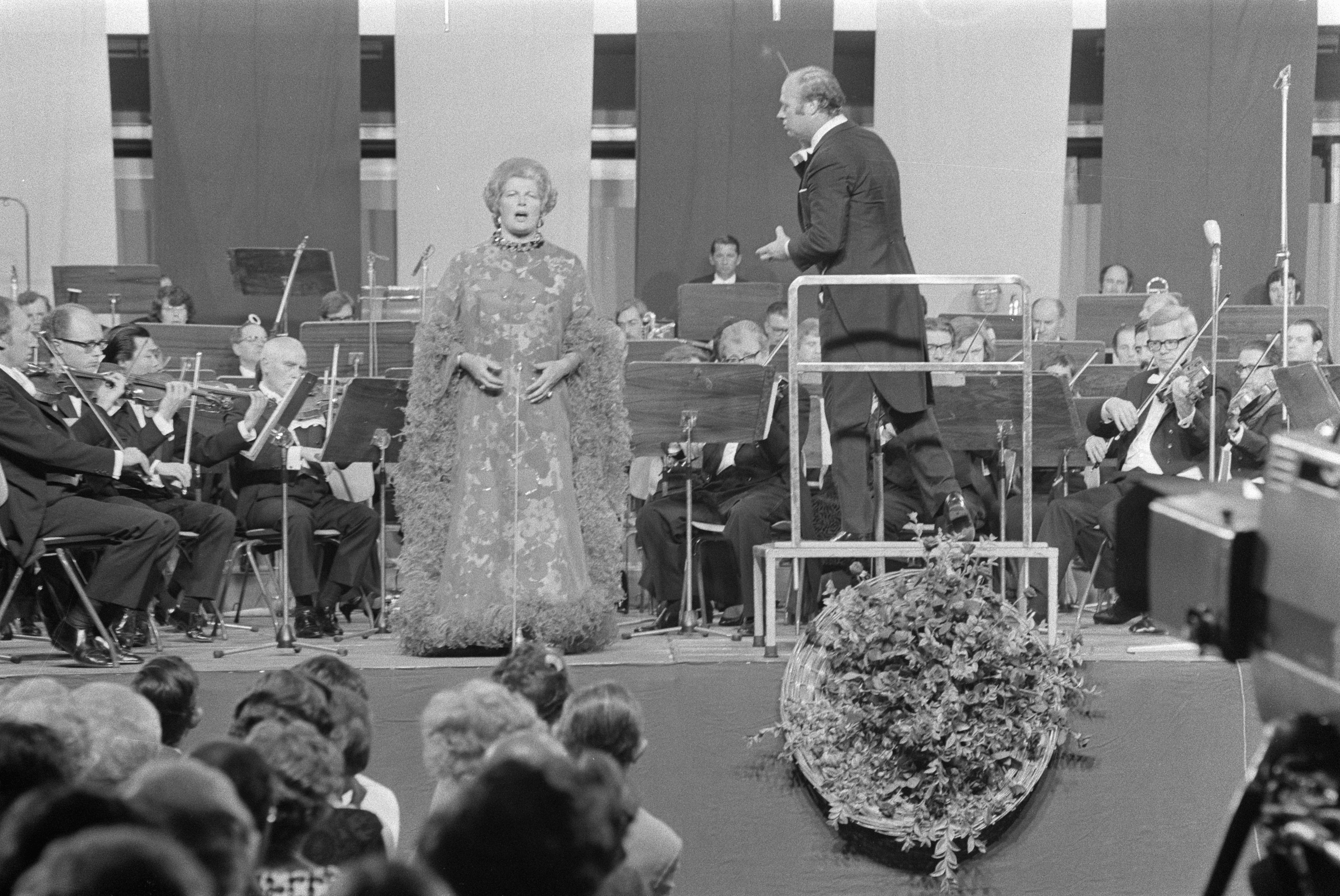 Collectie / Archief : Fotocollectie Anefo Reportage / Serie : [ onbekend ] Beschrijving : Afscheidsconcert van Gre Brouwenstijn met Concertgebouworkest in RAI Amsterdam Datum : 25 juni 1971 Locatie : Amsterdam, Noord-Holland Trefwoorden : concerten Persoonsnaam : Gre Brouwenstijn Instellingsnaam : Concertgebouworkest Fotograaf : Peters, Hans / Anefo Auteursrechthebbende : Nationaal Archief Materiaalsoort : Negatief (zwart/wit) Nummer archiefinventaris : bekijk toegang 2.24.01.05 Bestanddeelnummer : 924-6785